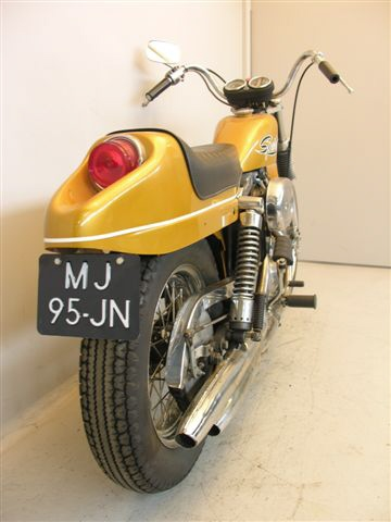 Harley-Davidson Sportster